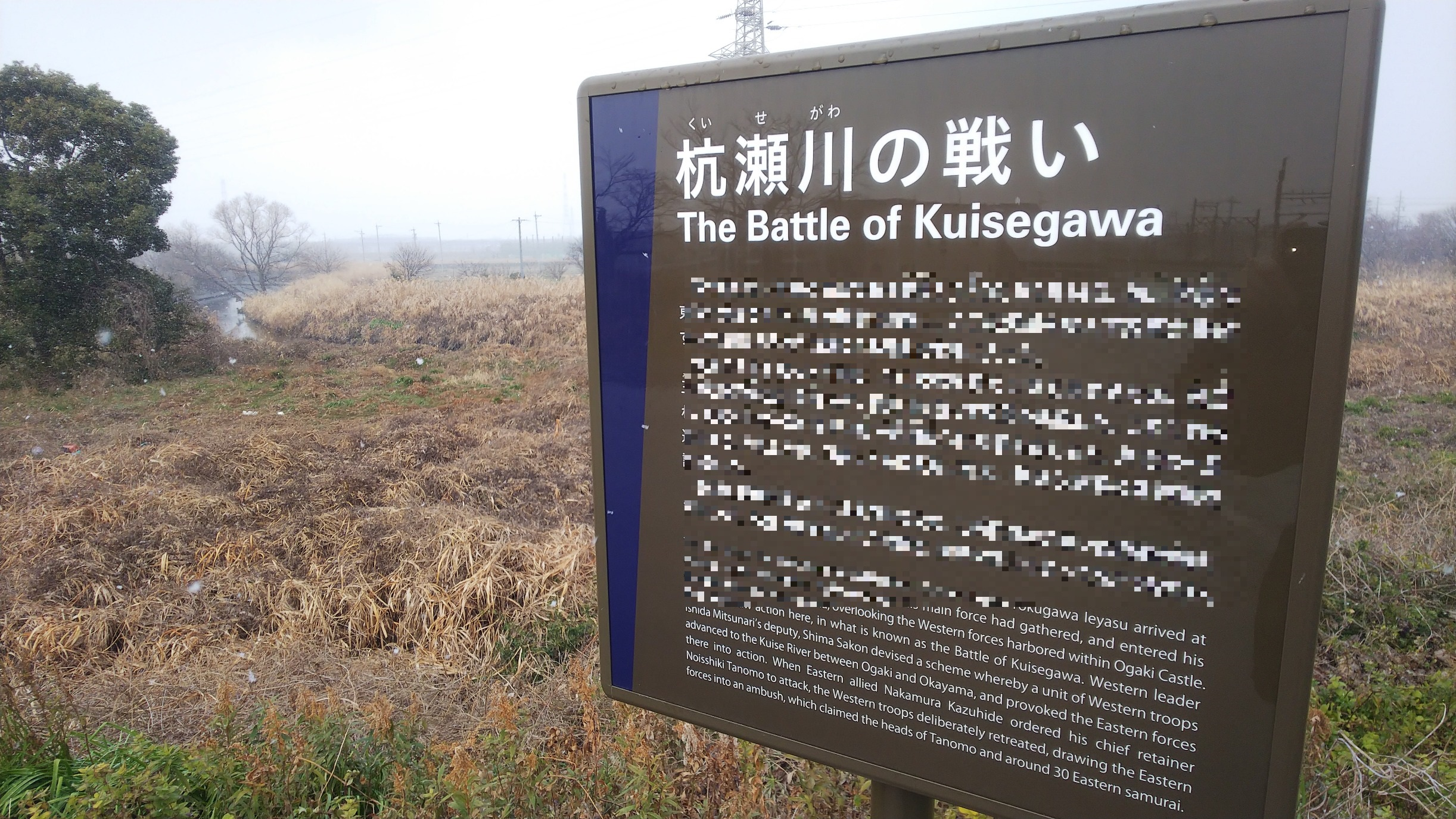 杭瀬川の戦いの案内板